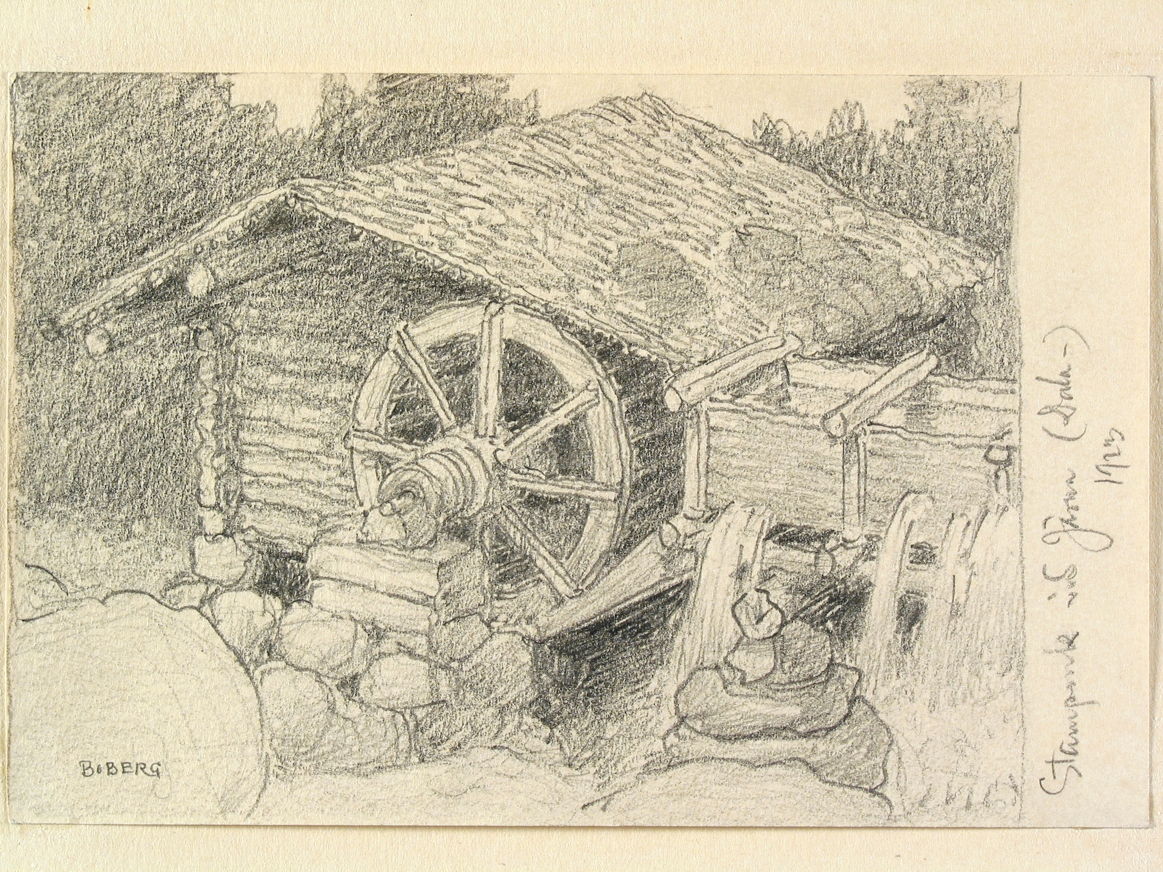 Dalarna, Järna sn., Dala-Järna. Stampkvarn. Teckning av Ferdinand Boberg Depicted place: Järna sn., Dala-Järna (Ortnamn därutöver), Dalarna County (Q103732)